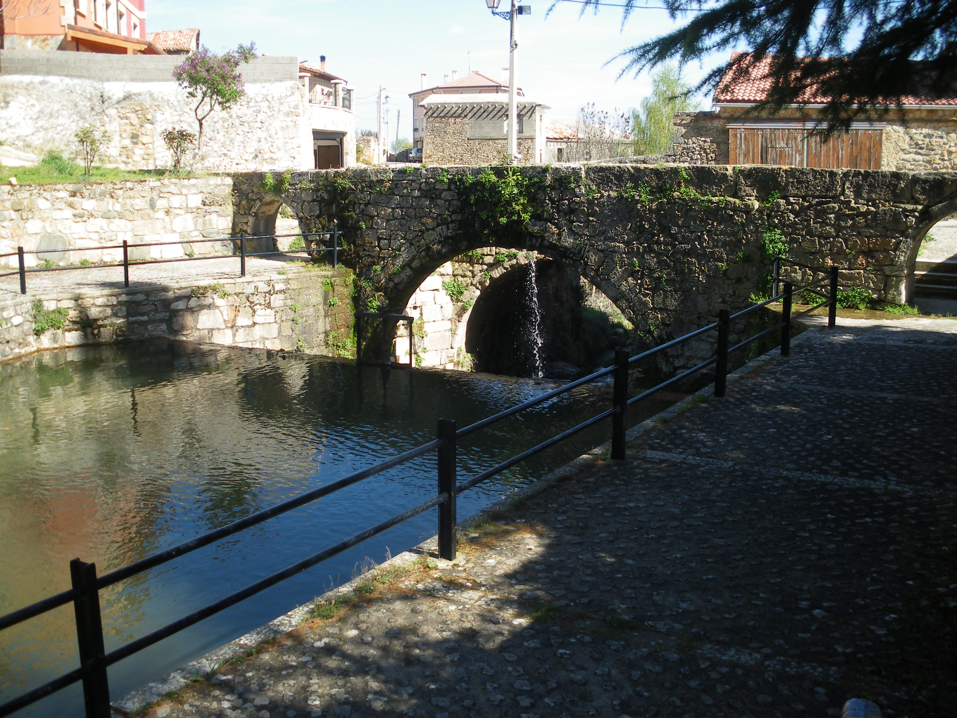 Poza de la Sal, provincia de Burgos, Castilla y León, España.